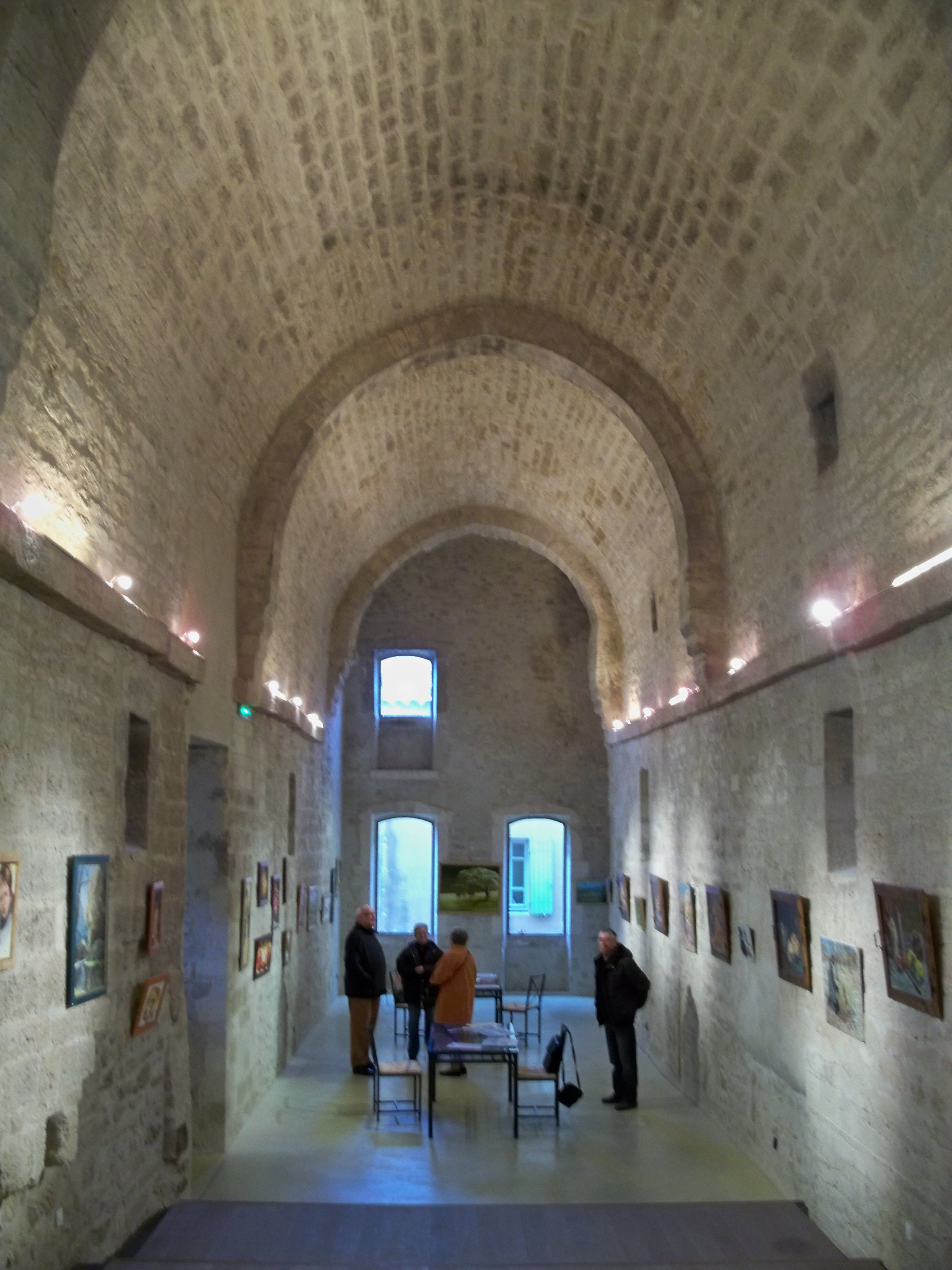 intérieur de la commanderie de Richerenches (84)